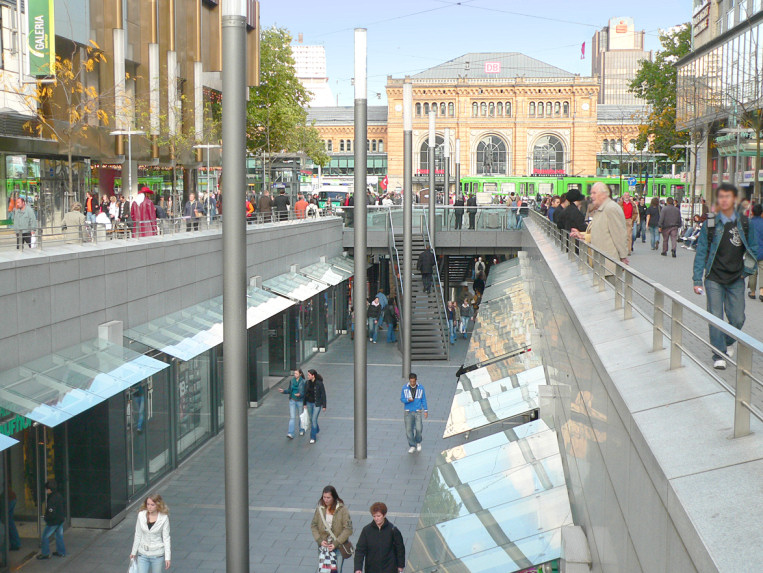 Niki-de-Saint-Phalle-Promenade Hannover, zwischen Kröpcke und Hauptbahnhof